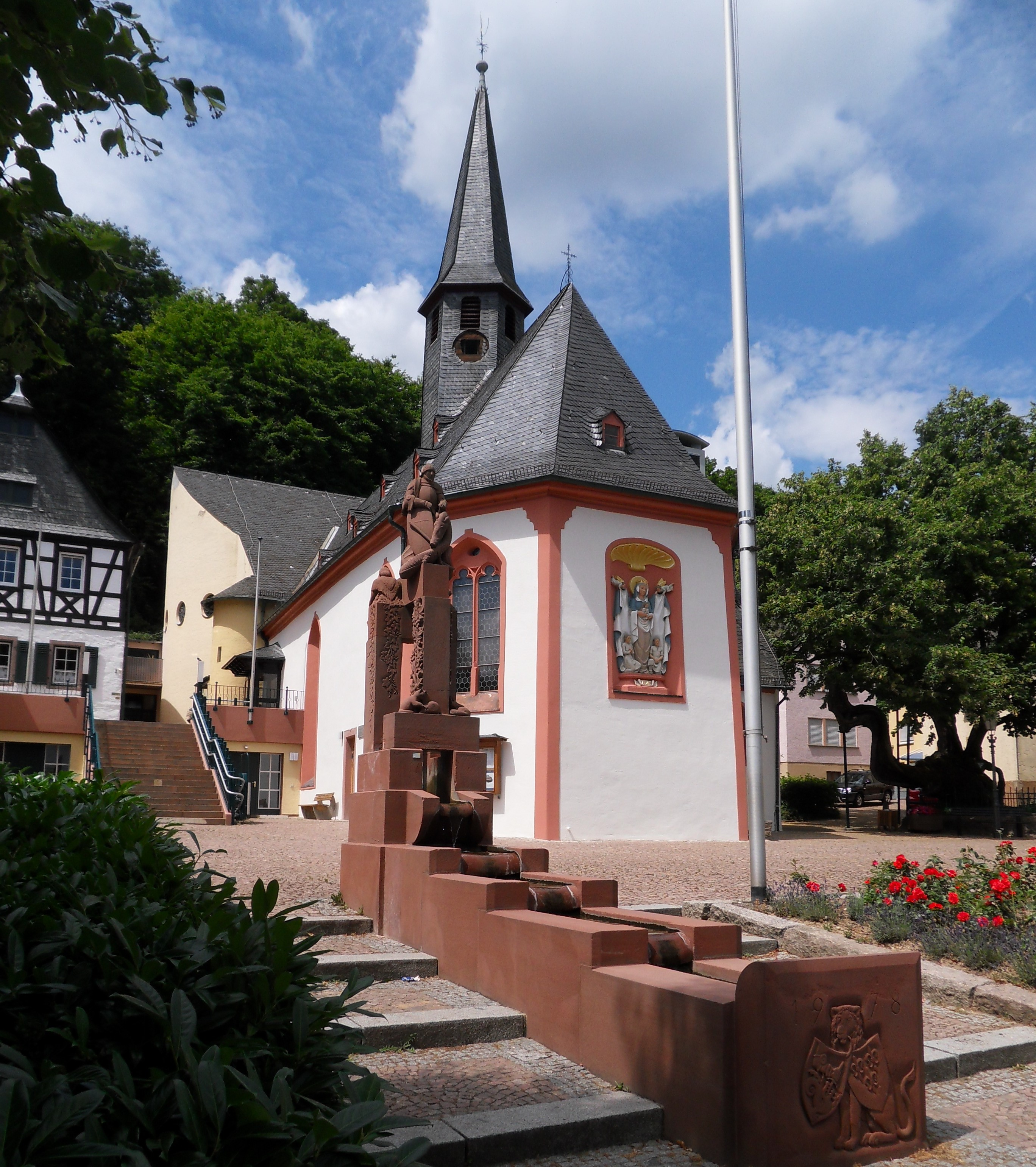 Kaskadenbrunnen aus Sandstein, errichtet 1978 mit vier kaskadenartig aufeinander folgenden Brunnentrögen, gekrönt von einer Skulptur des Drachentöters, gelegen in Wiesbaden-Frauenstein vor der Kirche St. Georg und Katharina, am rechten Bildrand die Blutlinde